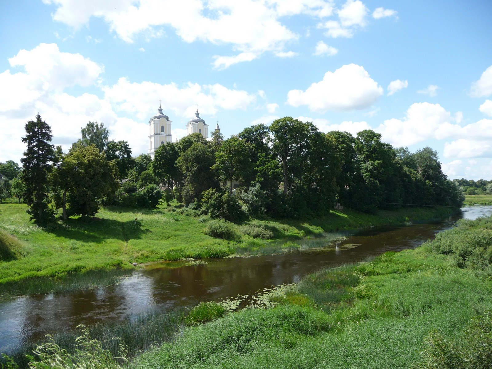 Šešupė ties Kudirkos Naumiesčiu